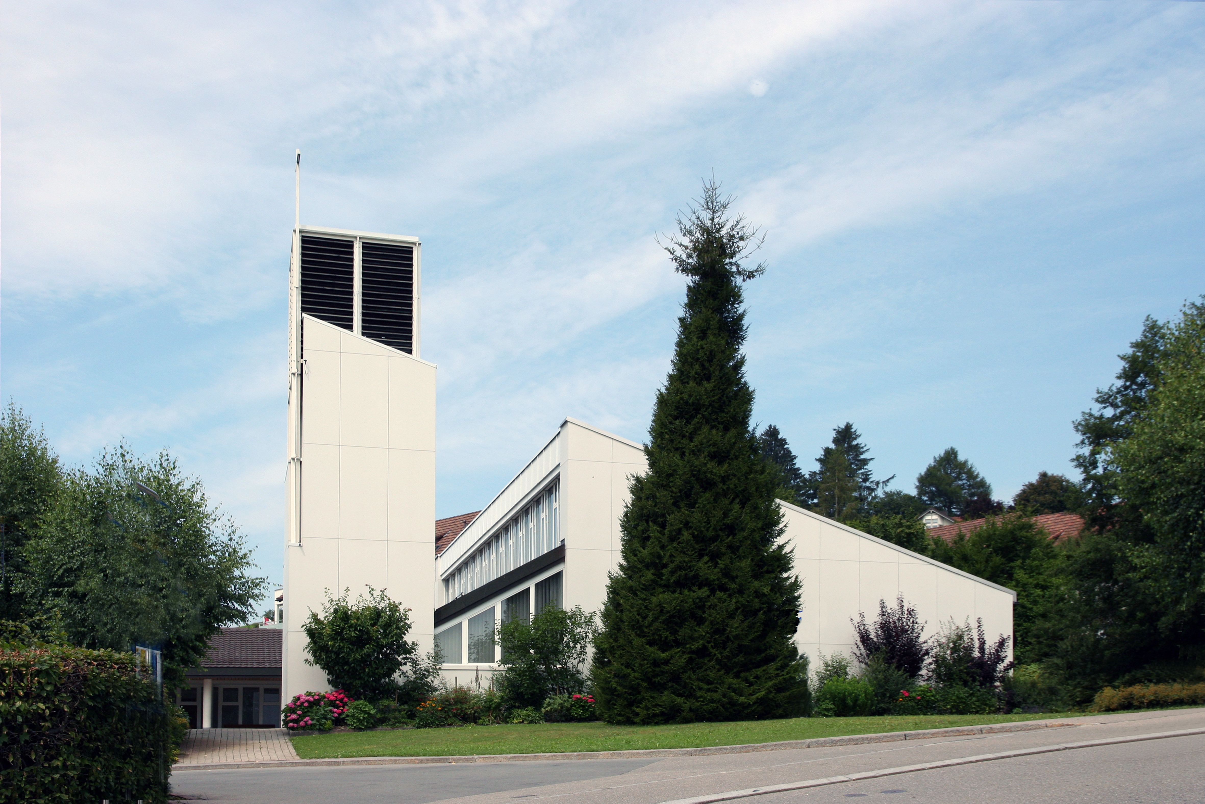 Römisch-katholische Kirche St. Antonius in Hirzel ZH, Ansicht von der Dorfstrasse